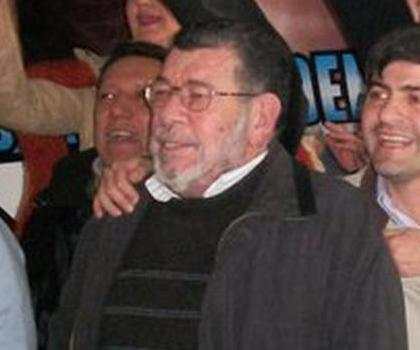 Hugo Rubén Perié, ex-Gobernador de Corrientes y Diputado Nacional por dicha provincia